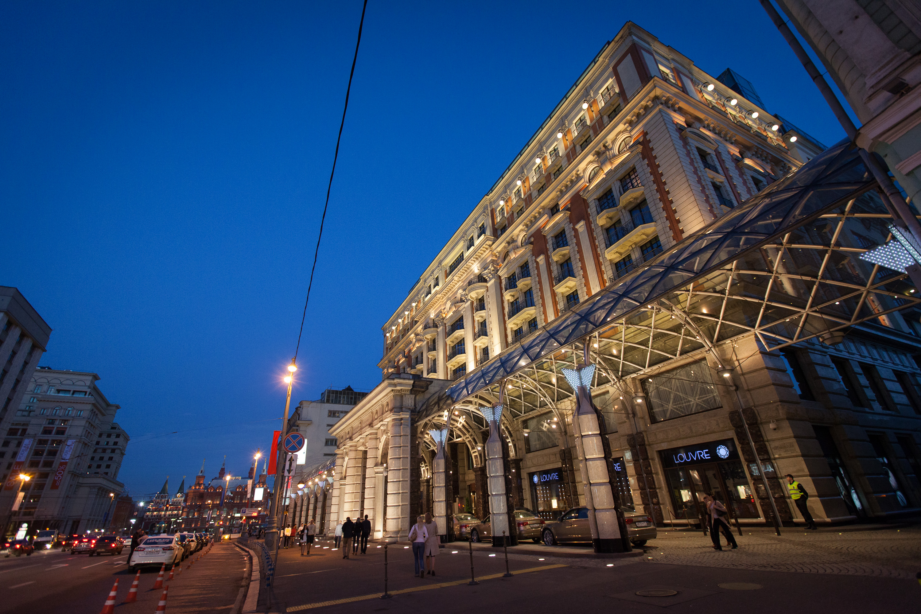 Moscow